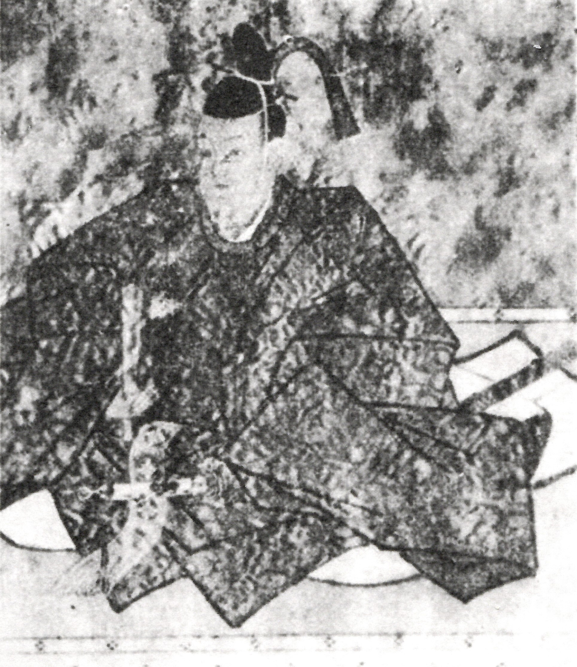 尚庸系永井家2代、下野烏山藩主、播磨赤穂藩主、信濃飯山藩主、武蔵岩槻藩主・永井直敬の肖像画。